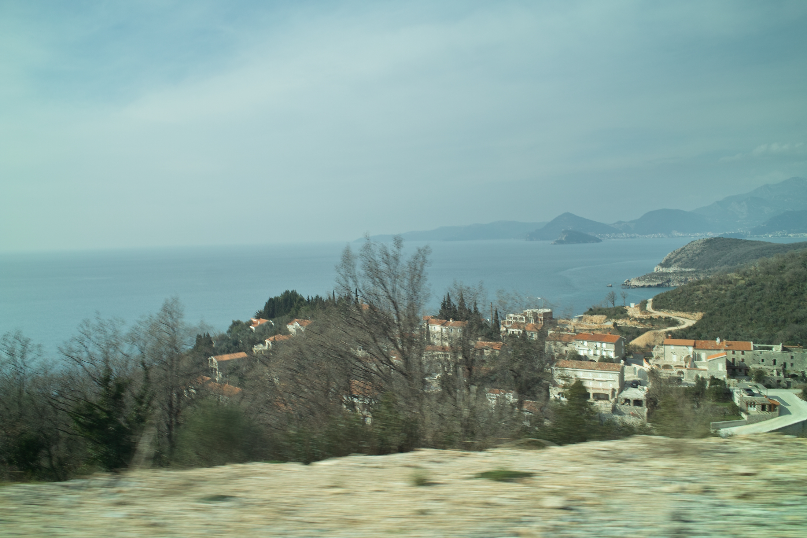 SDIM0039